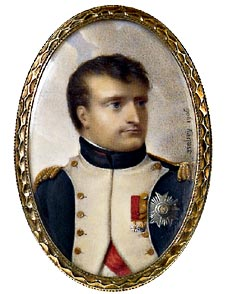 Van de Prinselijke website Een vroeg 19e eeuws medaillon